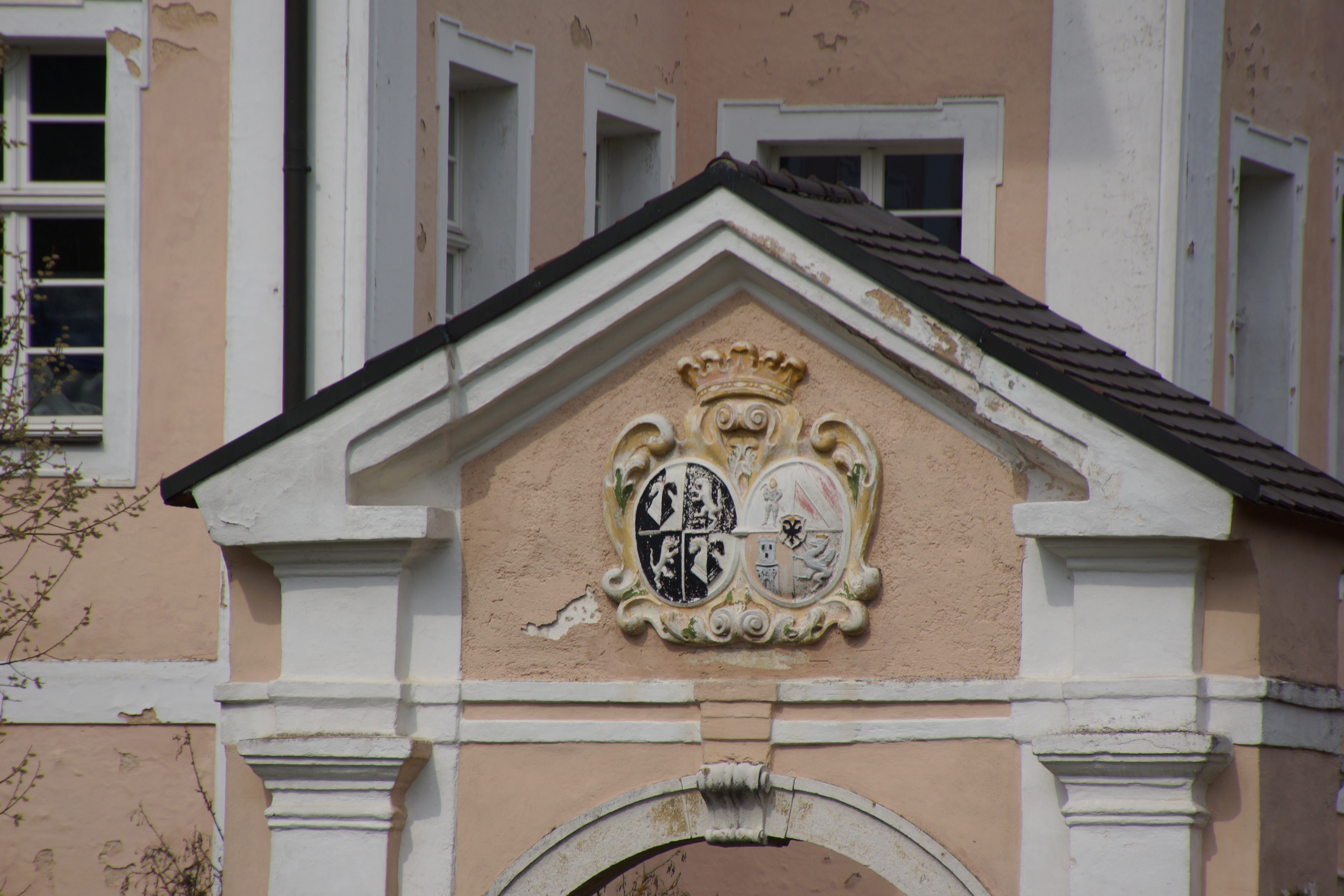 Das Hammerschloss in Dietldorf in der Oberpfalz; Wappen Friedrich Eberhart Tänzl von Tratzberg und Maria Theresia Freiin von Altersheim auf Finsing